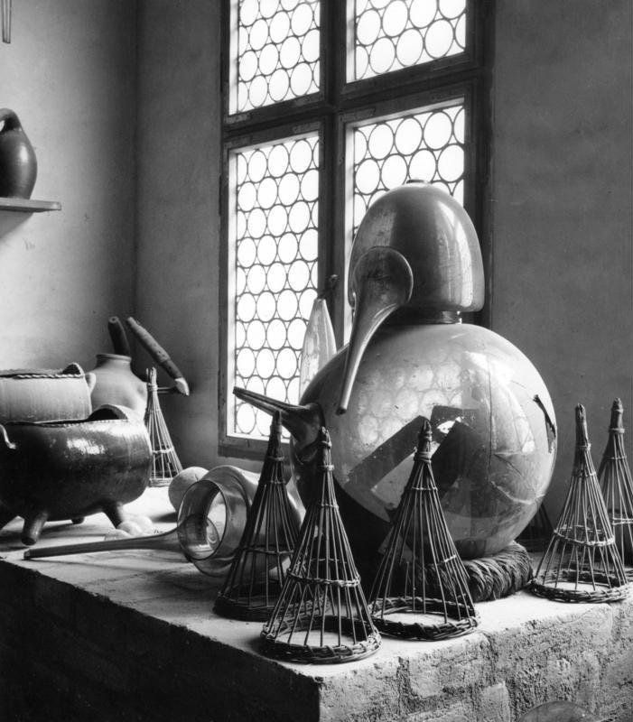 Germanisches Nationalmuseum in Nürnberg Desteliergefäße aus dem chemischen Laboratorium spätes 18. Jahrhundert